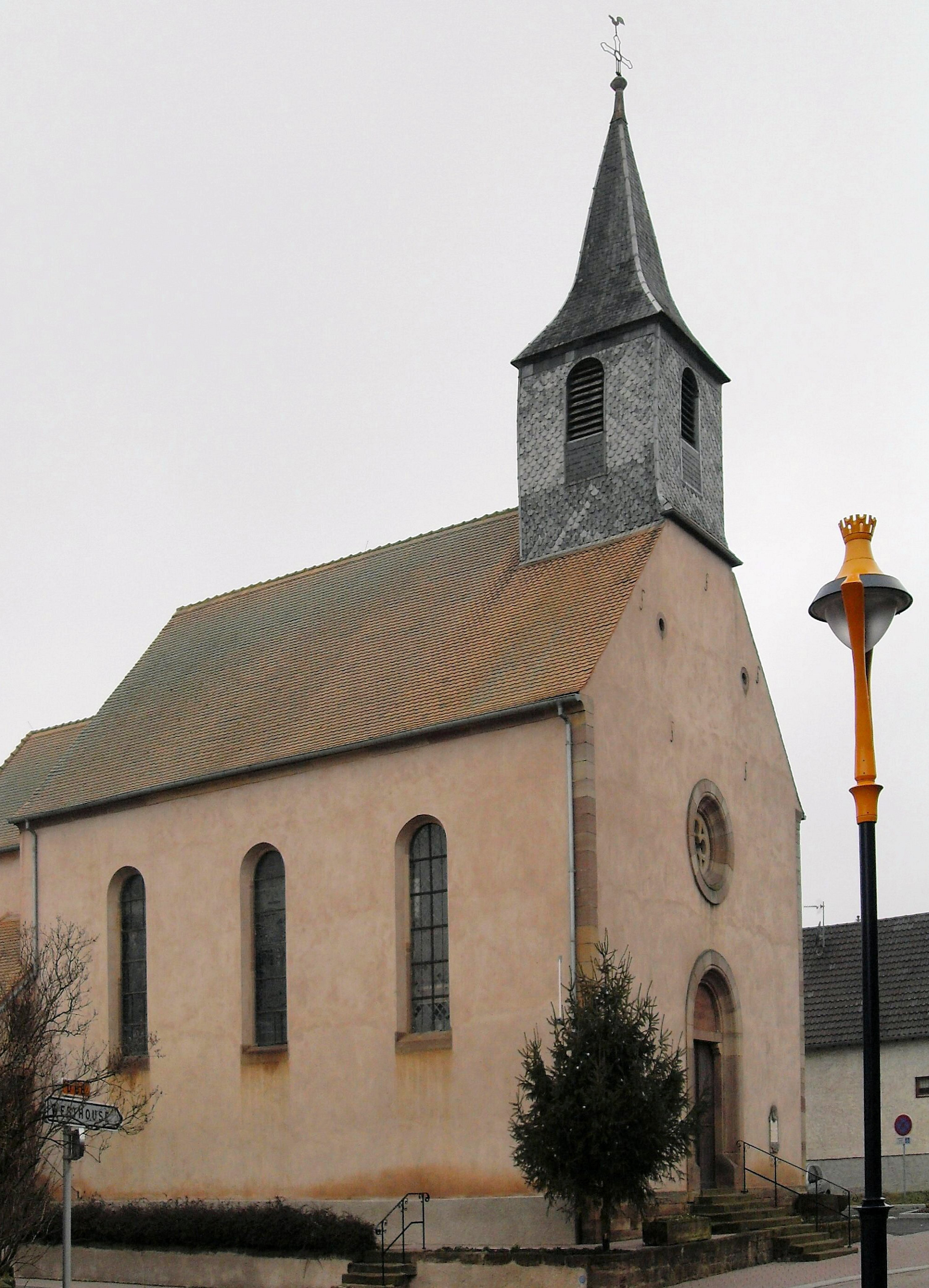 L'église Saint-Michel à Knœrsheim